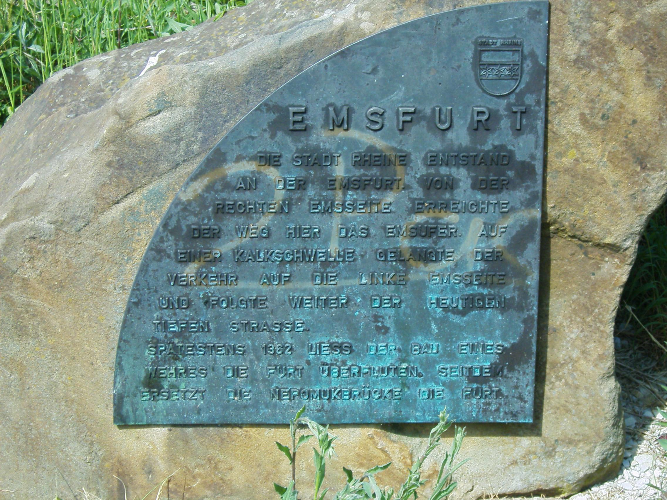 Gedenktafel an der ehemaligen Emsfurt in Rheine, Gedenkstein auf der rechten Emsseite (Timmermanufer), an der Stadthalle zwischen Thieberg und Stadtberg